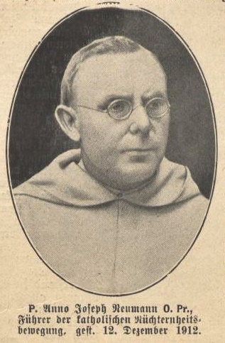 Anno Joseph Neumann (1856-1912) Dominikaner, Gründer des Kreuzbundes gegen Alkoholkonsum